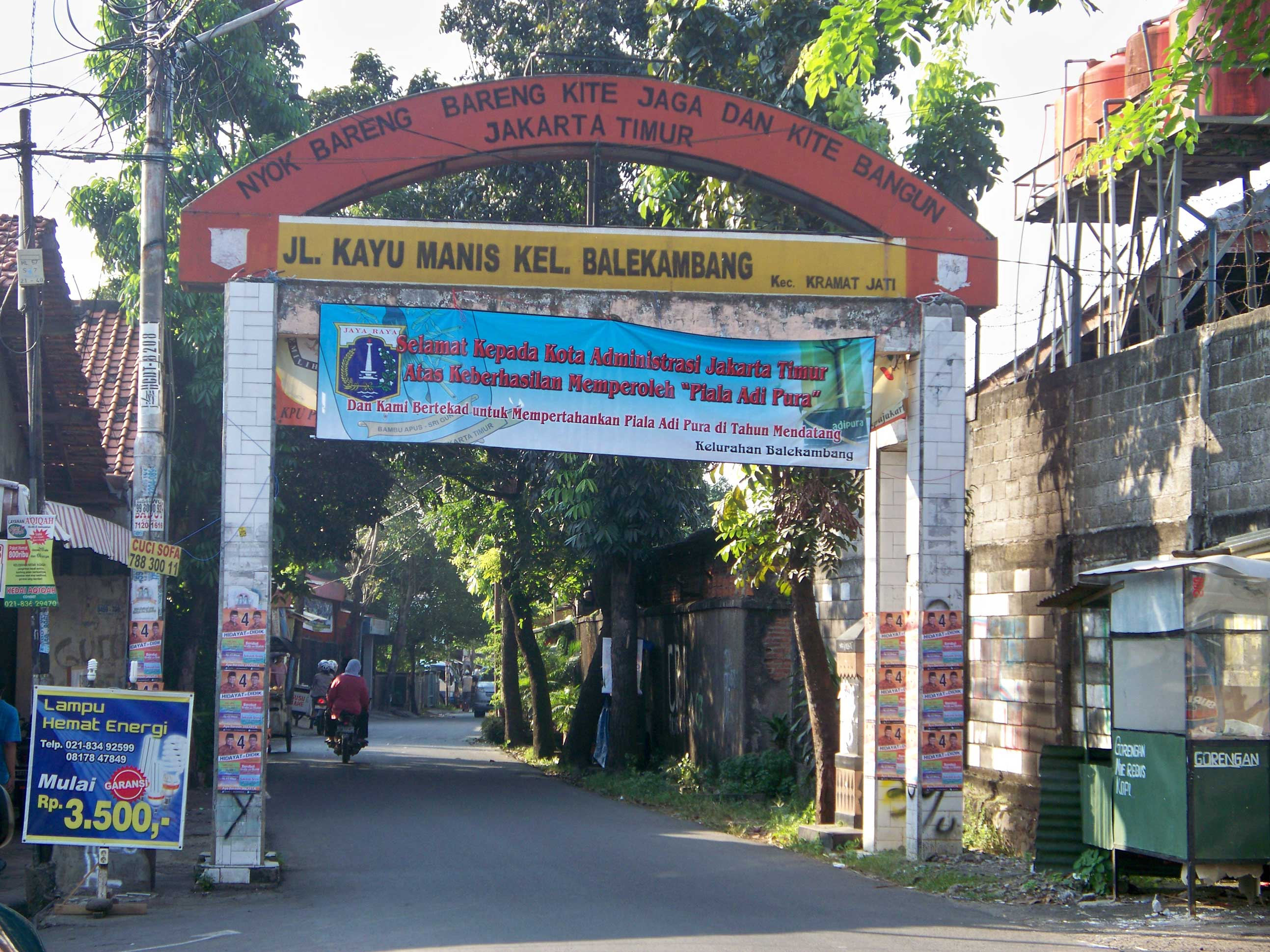 Gardu Kayu Manis Condet